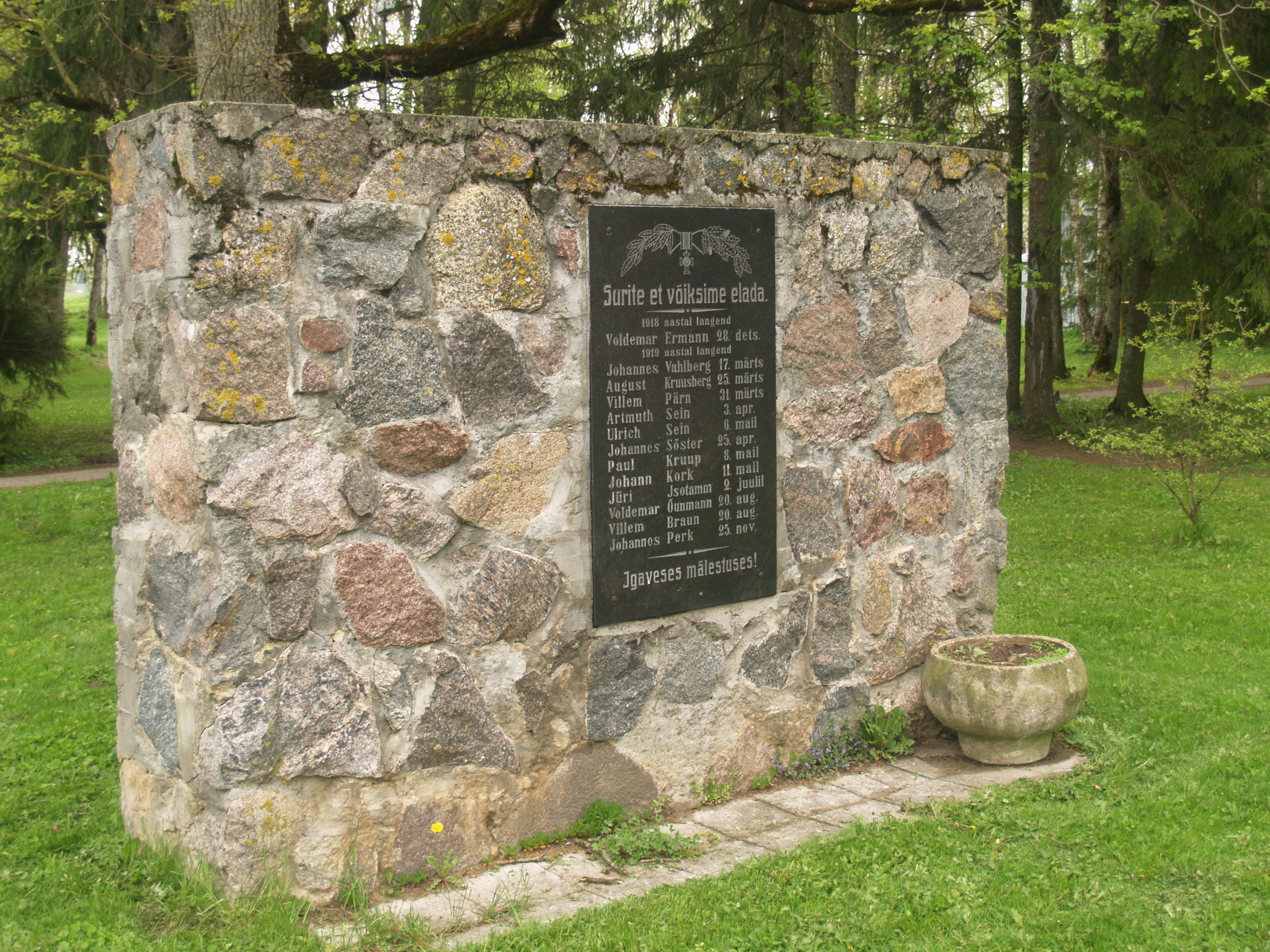 Vabadussõja mälestusmärk Vaimastveres Jõgeva vallas